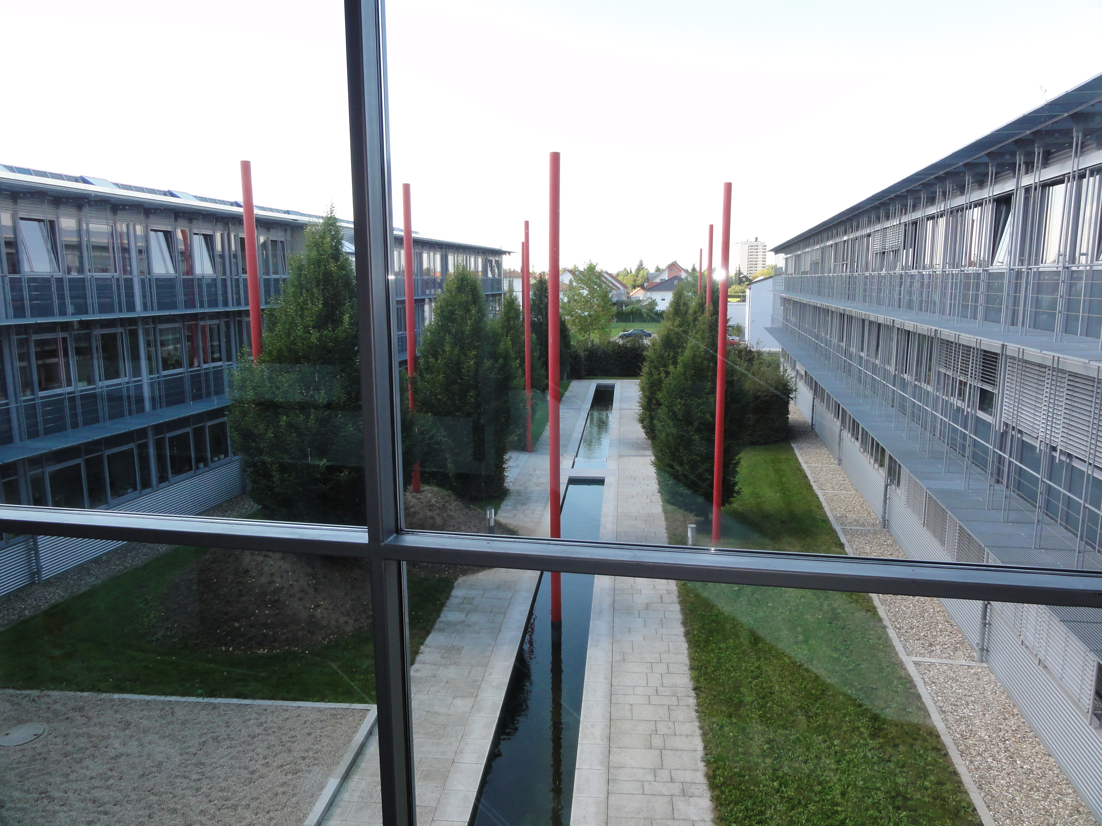 Straubing - Bayerisches Polizeiverwaltungsamt Info GPS data may be inaccurate. EXIF data regarding date and time may be inaccurate.